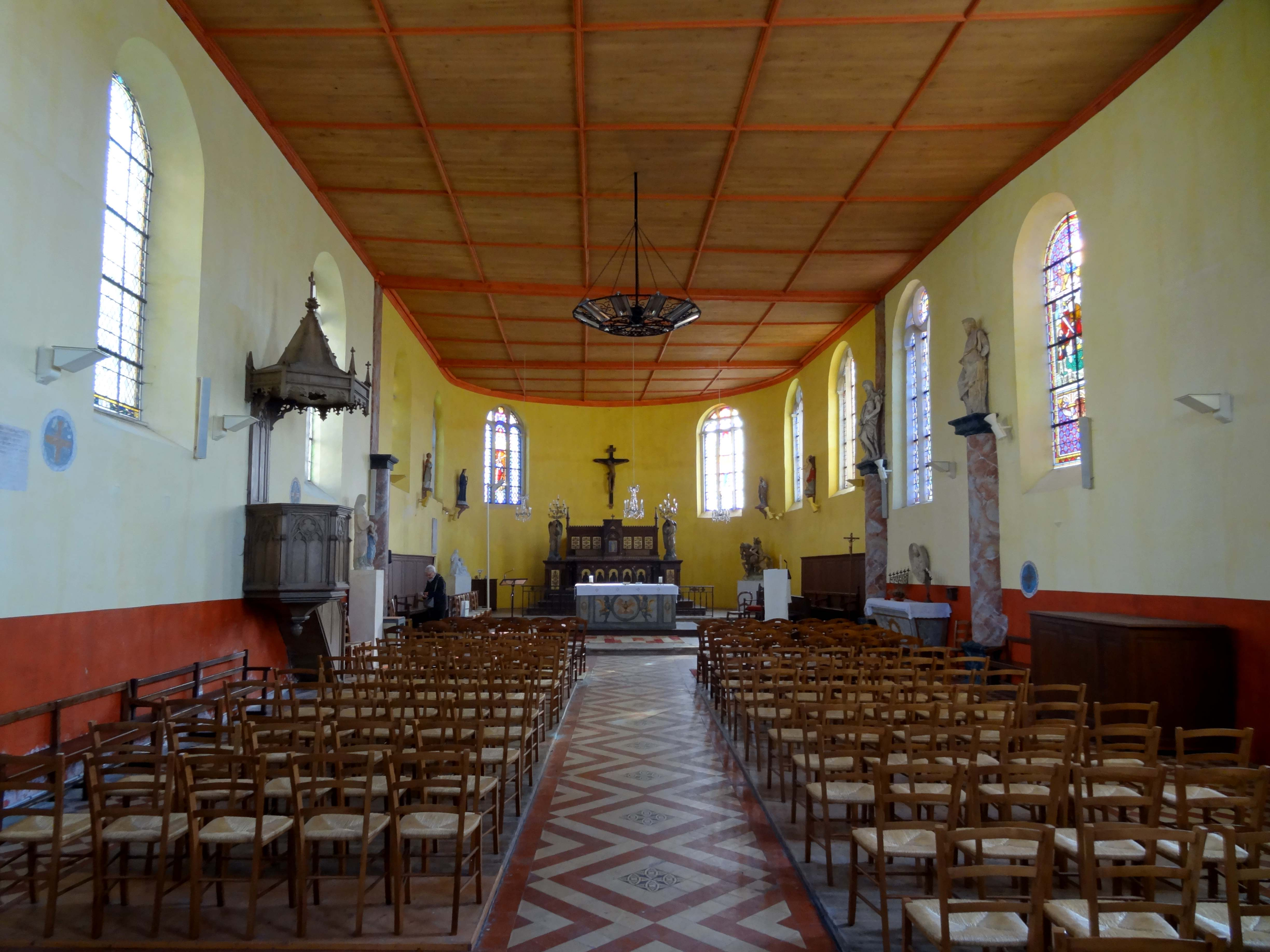 Intérieur de l'église - voir titre.